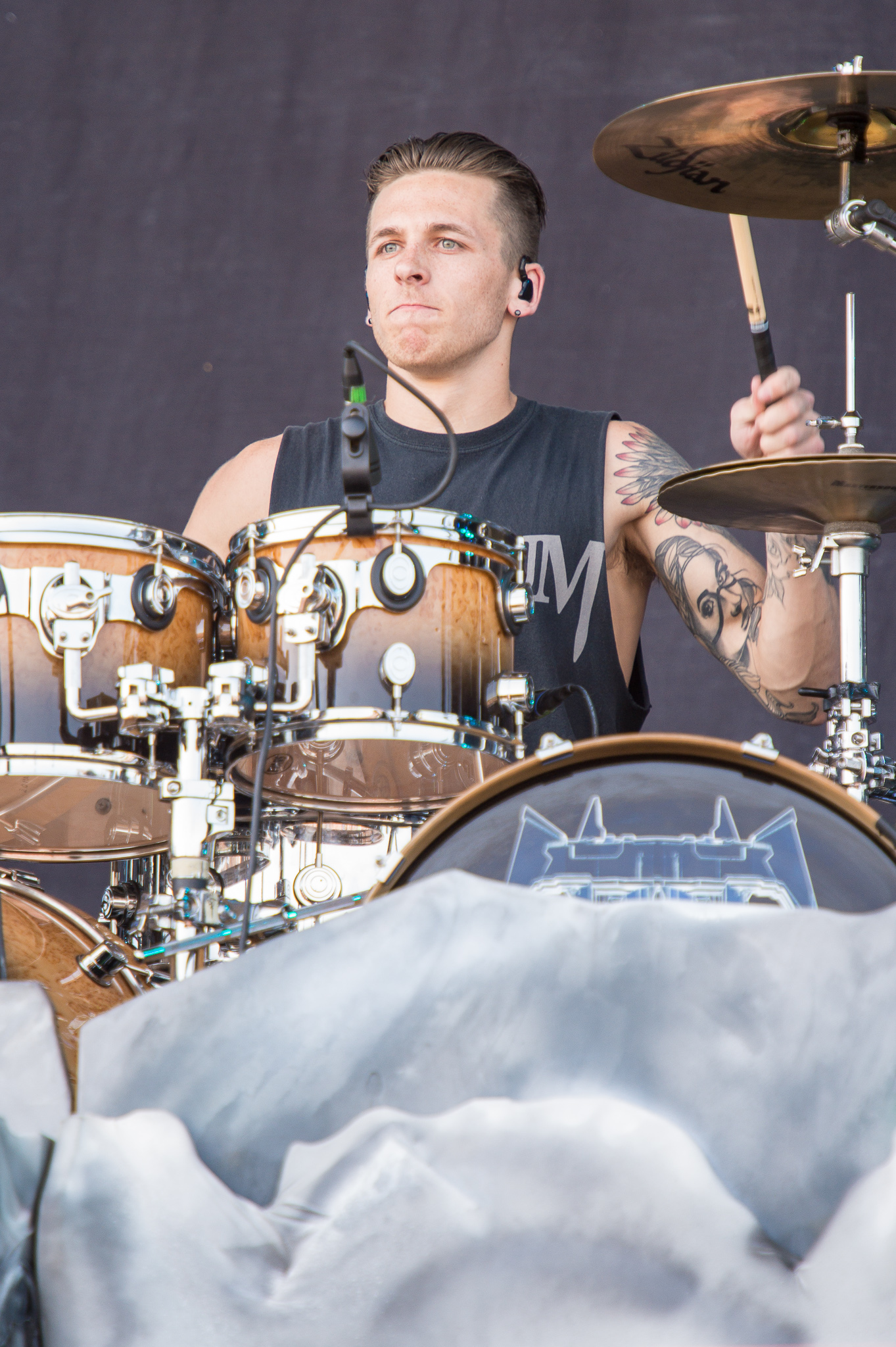 ARGO-Konzerte,Centerstage,Konzert,Livekonzert,Livemusik,Musik,RiP,Rock im Park 2014,Trivium,Mathew Madiro,Mat Madiro